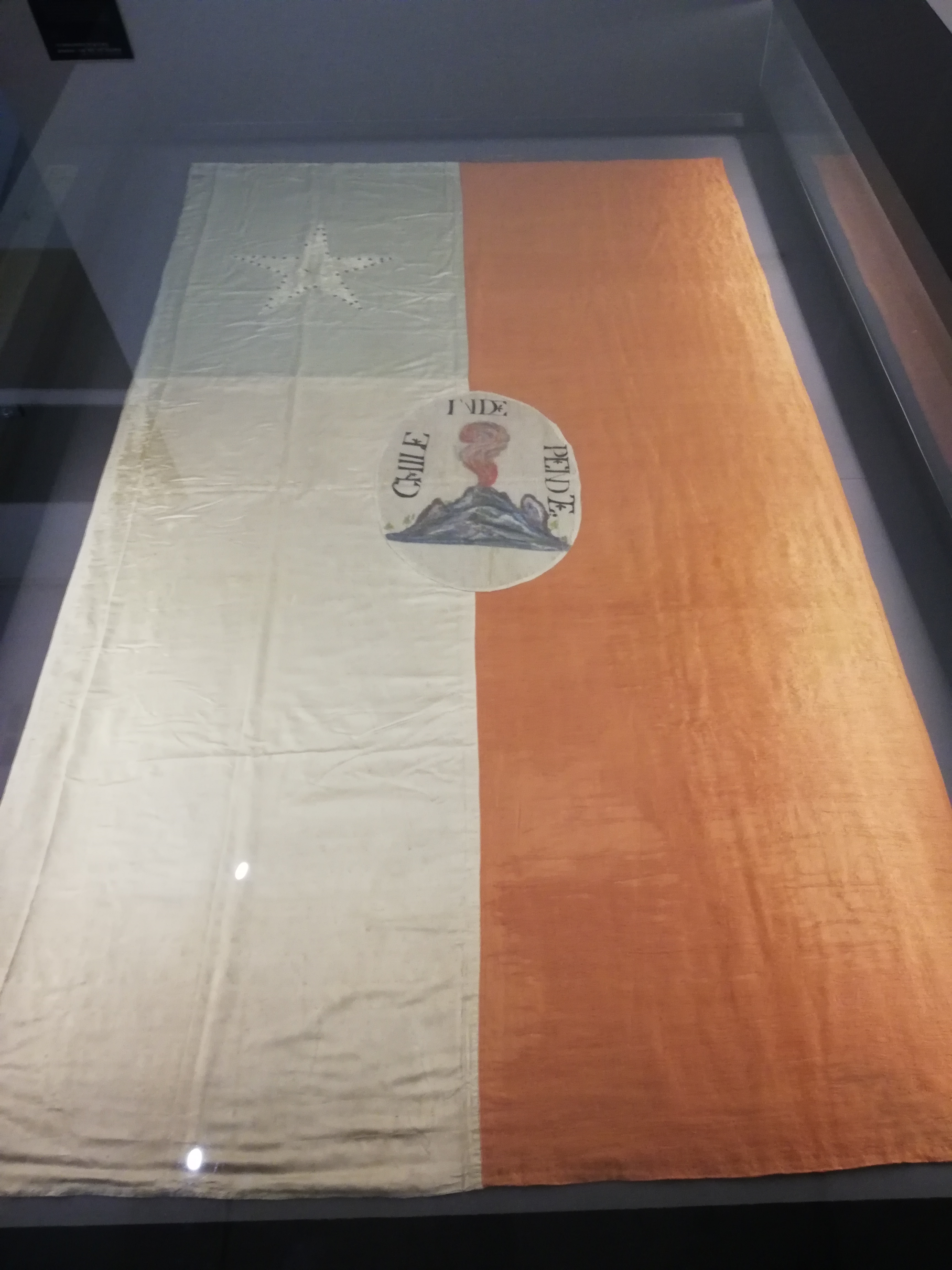 Bandera sobre la que se juró la independencia de Chile el 12 de febrero de 1818 y que fue robada por el MIR en 1980